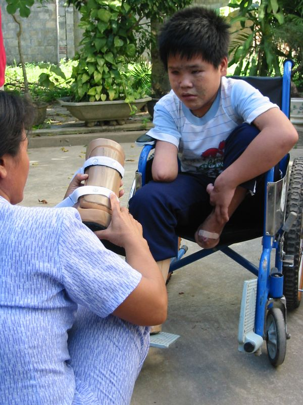 A landmine victim